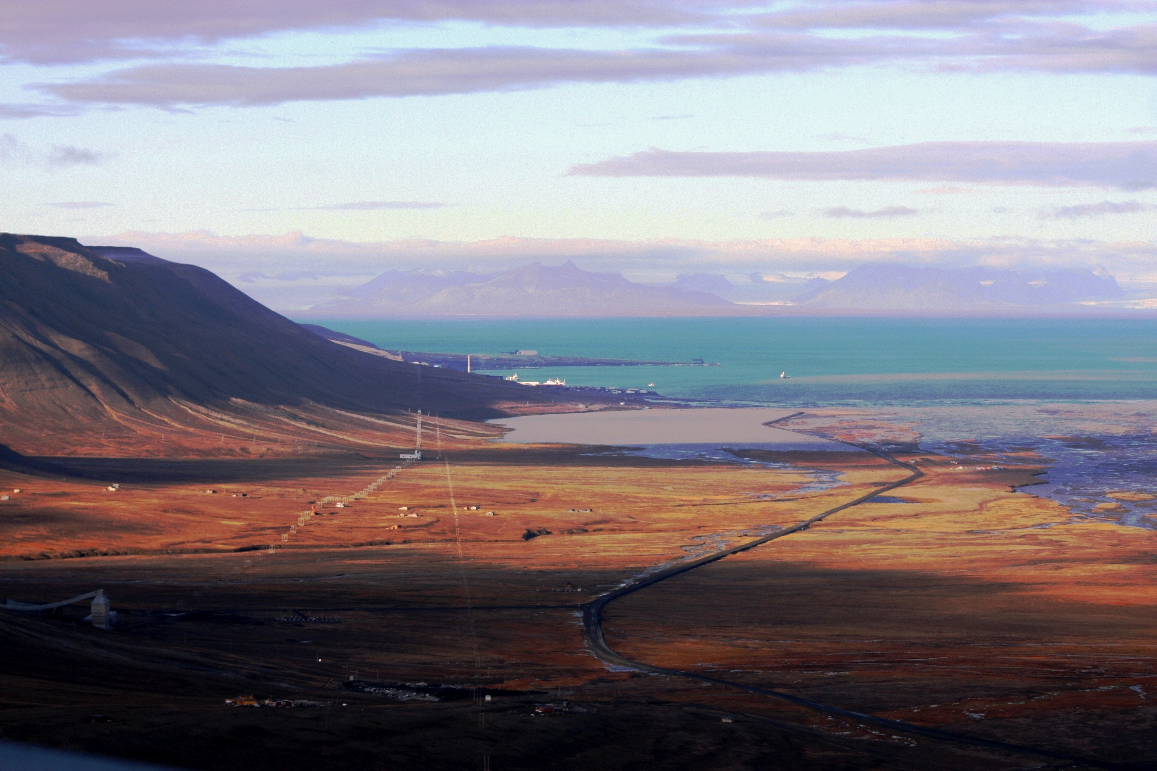 Isdammen vannkilde like øst for Longyearbyen